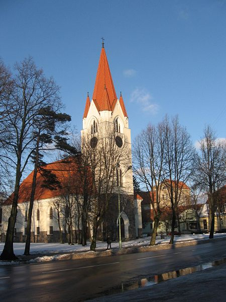 Šilutė. Evangelikų liuteronų bažnyčia